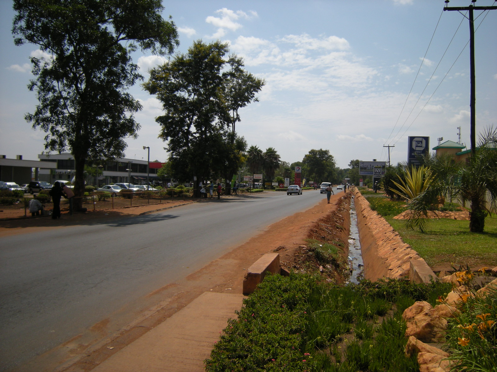 Capital do Malawi